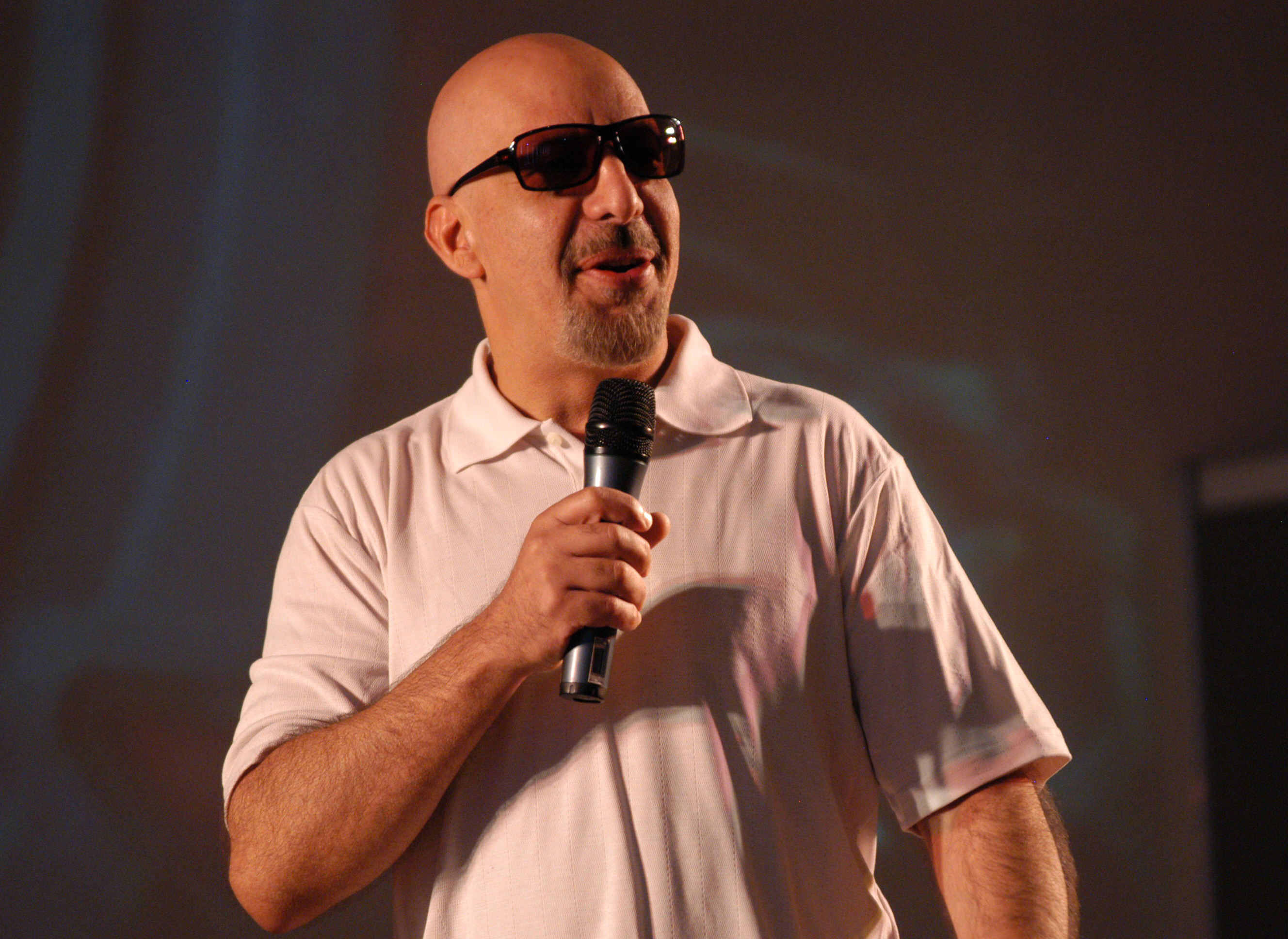 Erick Avari at GateCon 2006